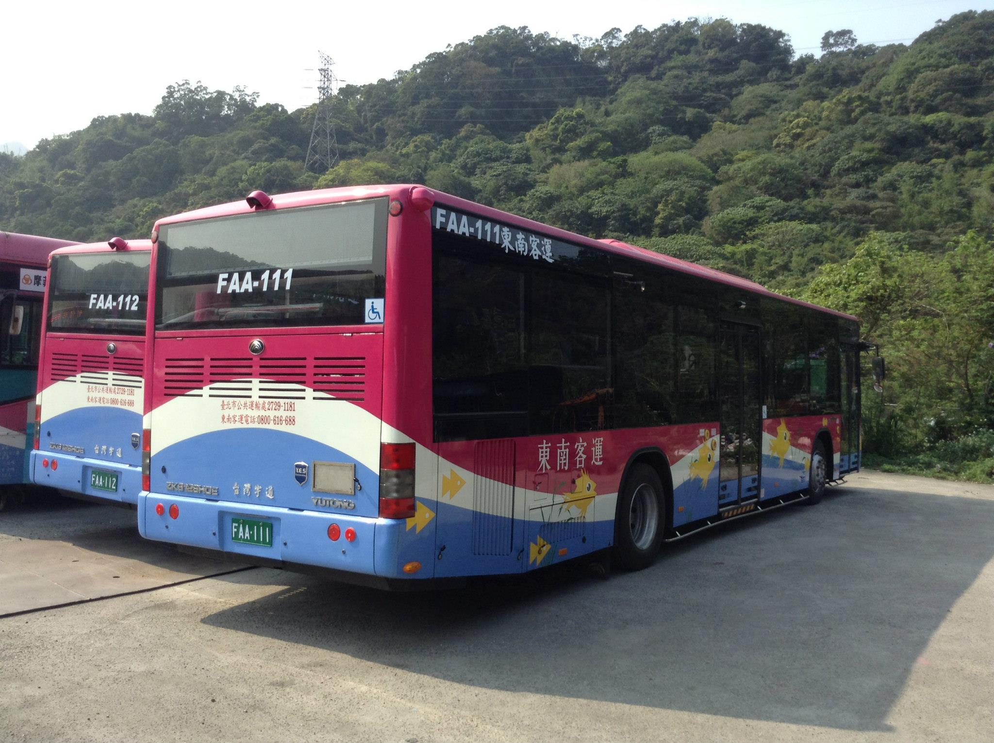 東南客運2013年第一批新車FAA-111.FAA-112